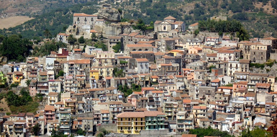 Una pietra sopra (Castiglione di Sicilia)